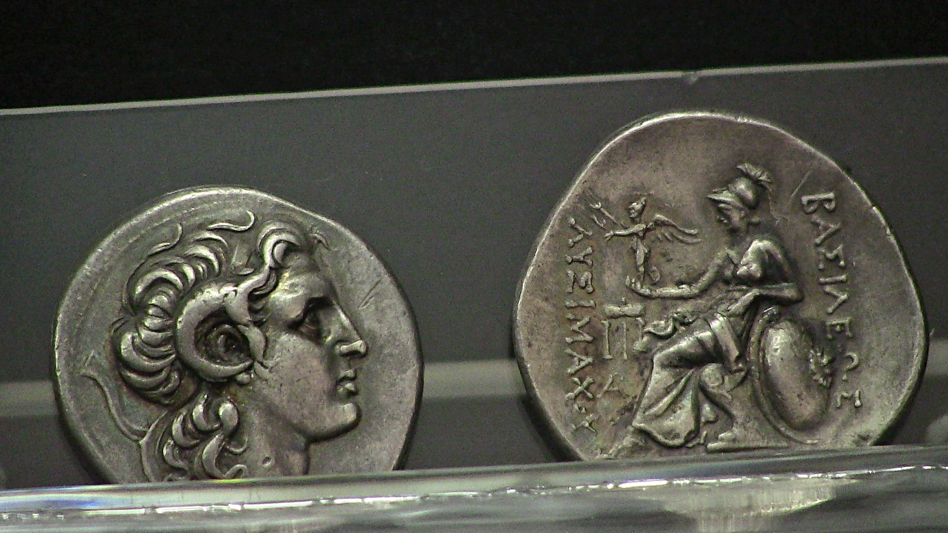 Münzen des Lysimachos gefunden in Kiršu (Meydancıkkale), ausgestellt im Museum von Silifke, Südtürkei